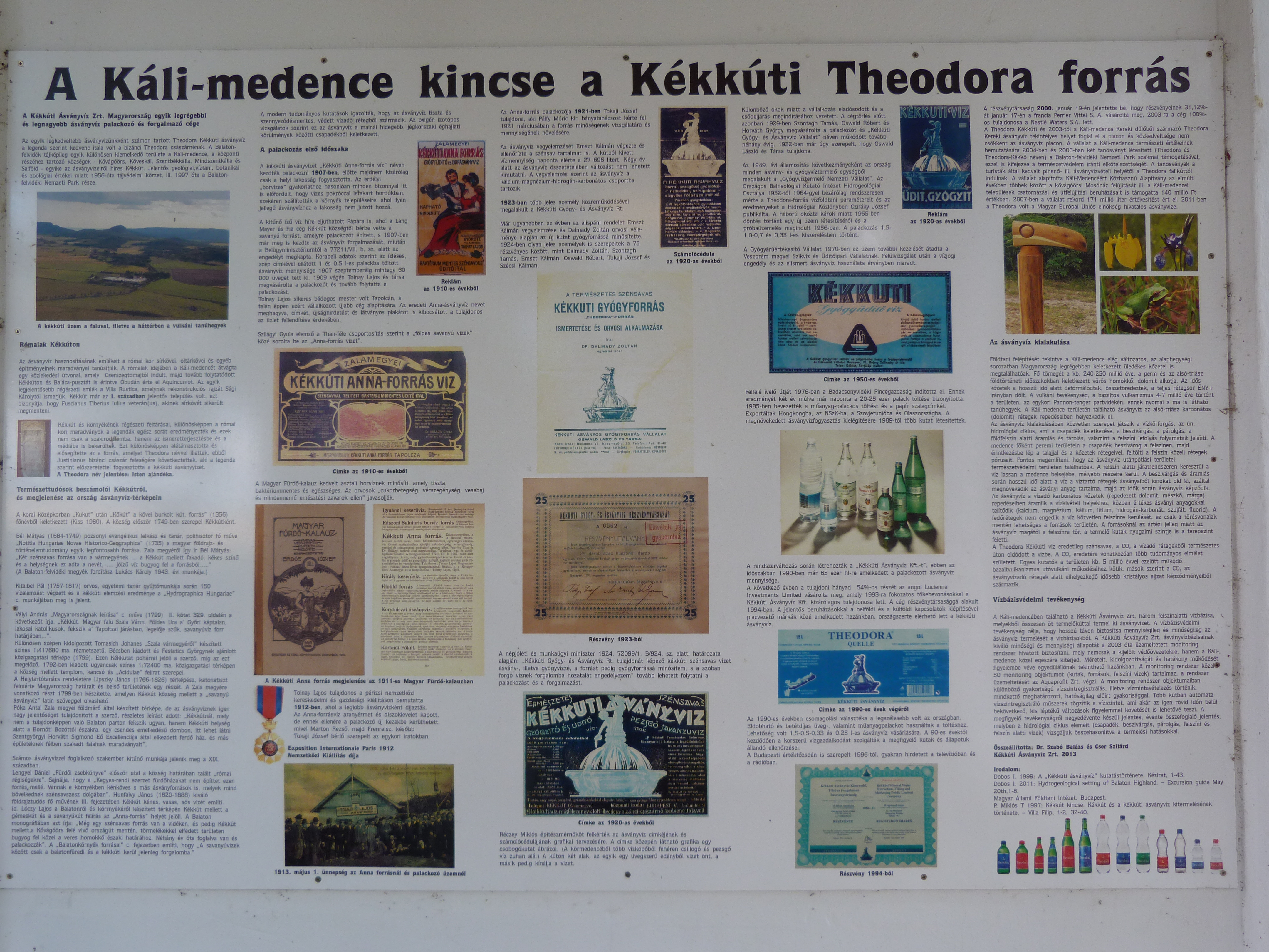 A felvételek 2014. július 6-én készültek Kékkúton, a Theodora forrásnál. Mérések szerint a kékkúti ásványvíz 13-000 – 16.000 éves. Megközelítése: Kékkútot Kővágóörs felé elhagyva, közvetlenül az út jobb oldalán forrásház és parkoló (3, 4). Hozama: közepes. A közelben indul a Theodora tanösvény a Ásványvíz Zrt. palackozóüzemétől, a Theodora Kereki forrástól (GPS: 46.8546795524, 17.5669915335), majd a Sásdi patak mentén a Kornyi-tó irányában halad. Forrás: Dr. Dobor Irma Kétezer év a Kékkúti ásványvíz életében Nemzeti Park Magyar Ásványvizek Cimkék: Kékkút Theodora Forrás Kékkúti Ásványvíz Zrt.